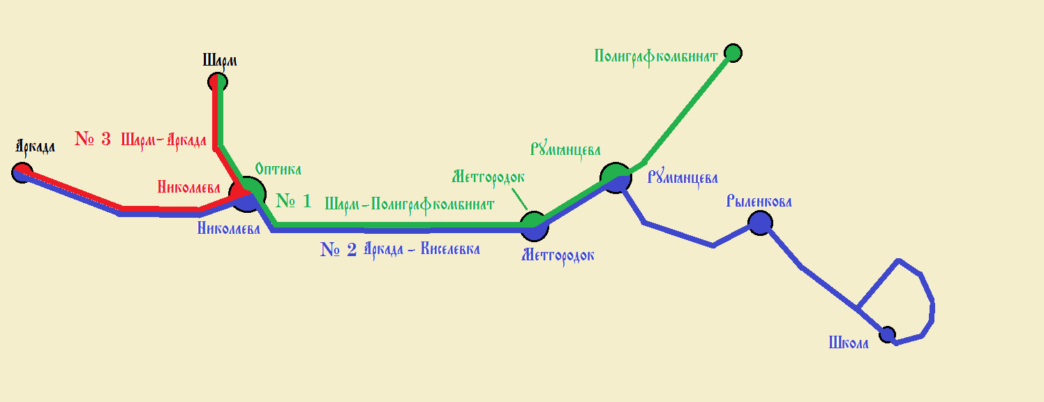 Схема городского транспорта (троллейбуса) Смоленска